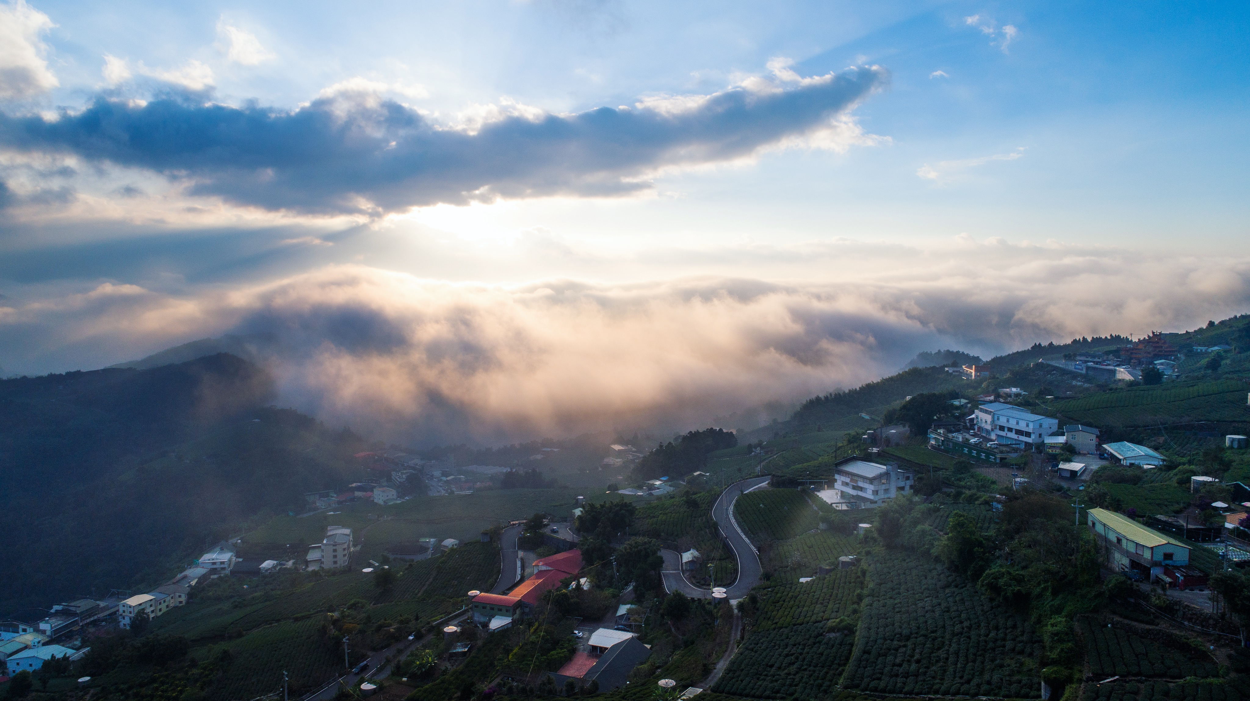 傍晚的阿里山區